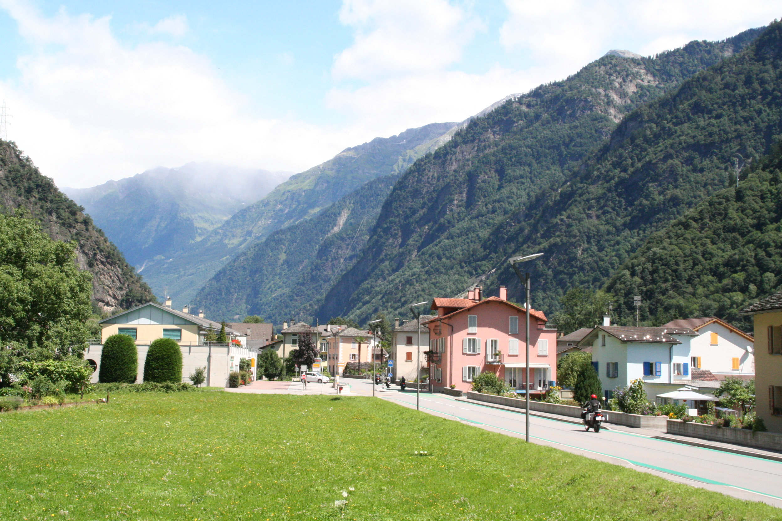 Lostallo